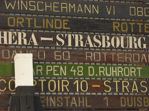 Bildo el la antverpena ŝipmuzeo.